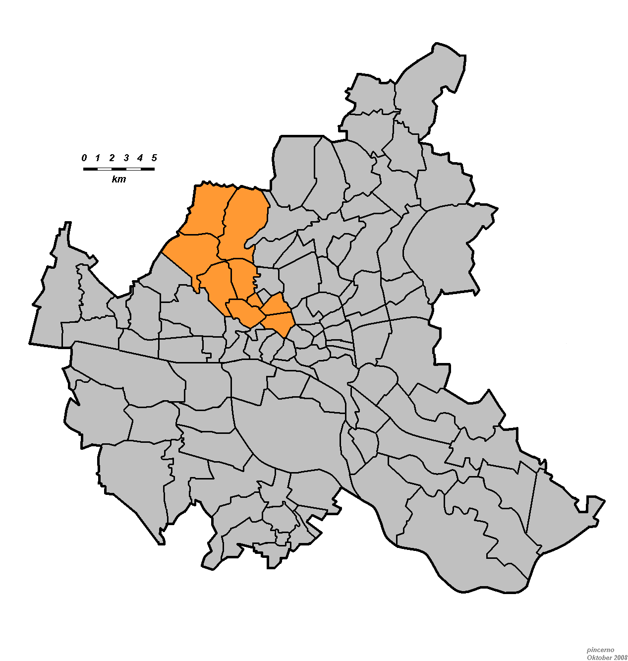 Der Bezirk Eimsbüttel in Hamburg.